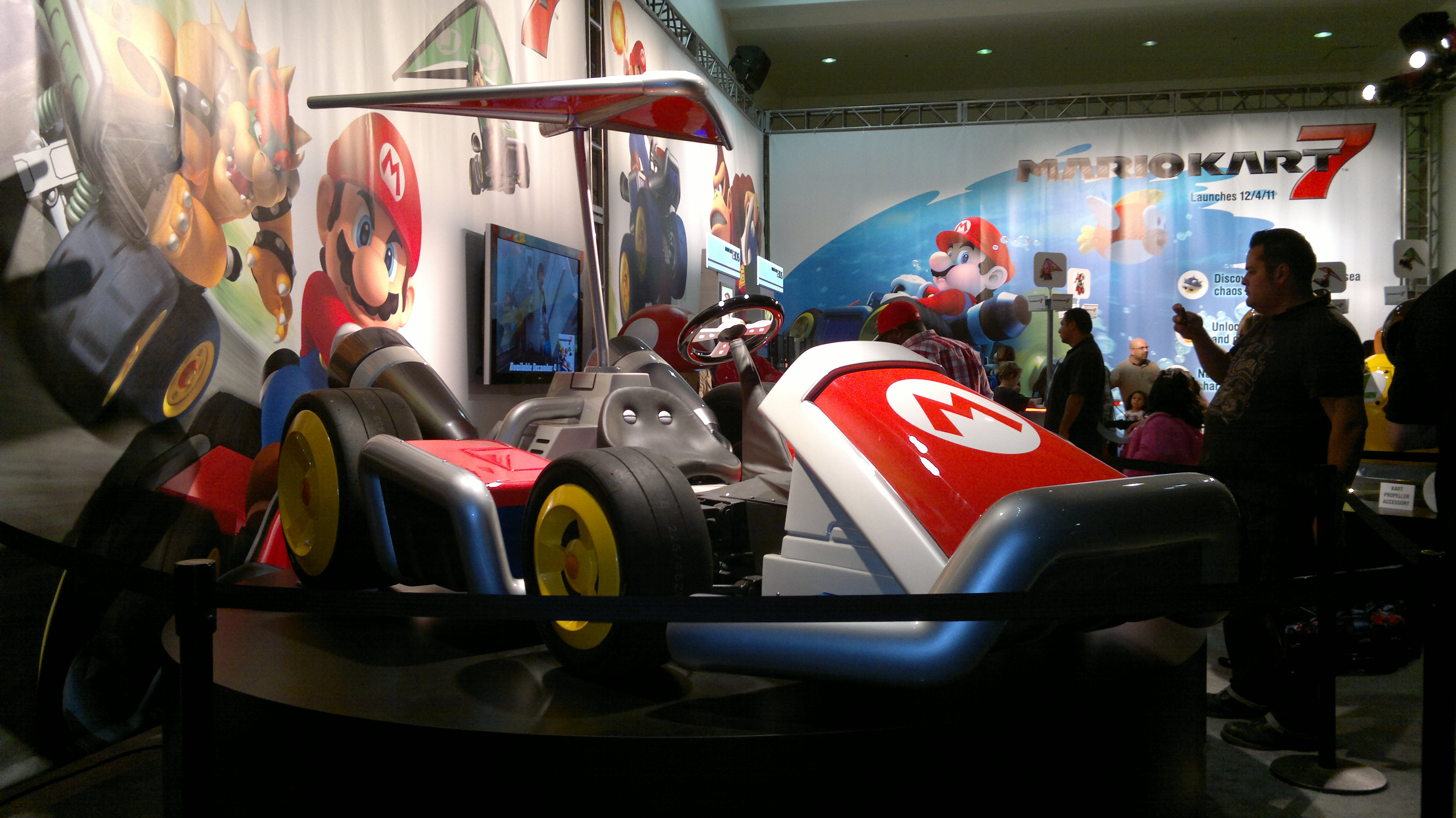 Mario Kart 7 au 2011 LA Auto Show (Los Angeles, Etats-Unis).